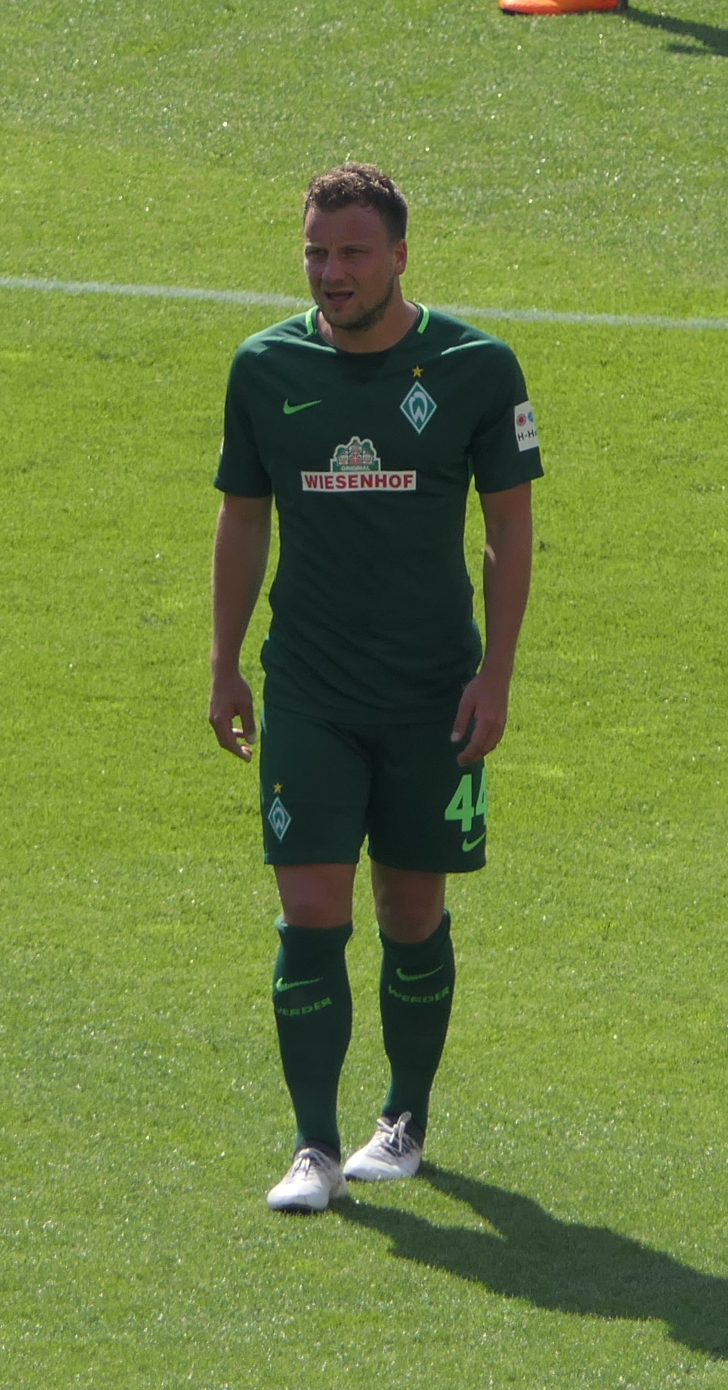 Der Fussballprofi Philipp Bargfrede im Trikot vom SV Werder Bremen beim Auswärtsspiel gegen den VfB Stuttgart am 21.04.2018.